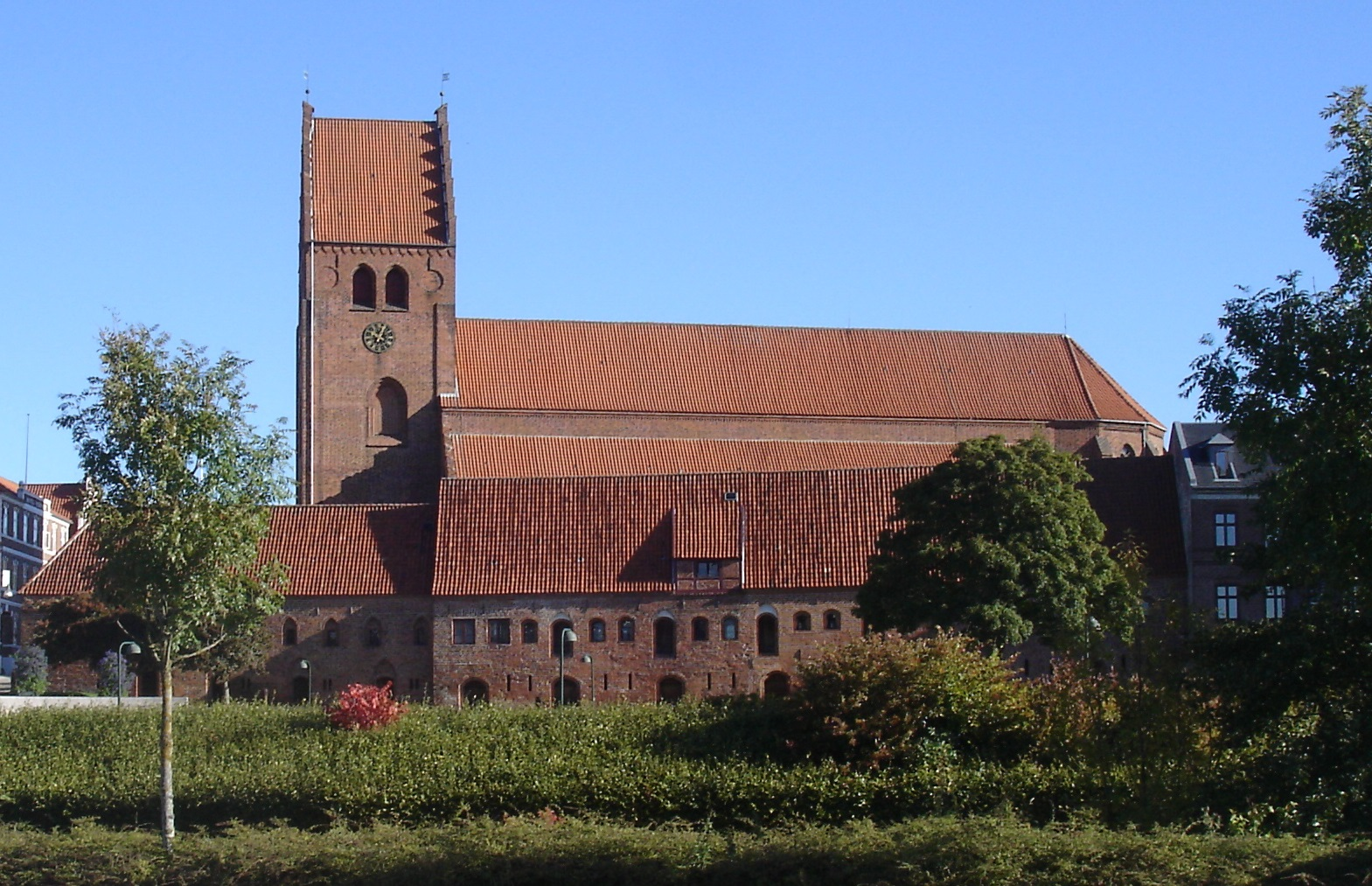 Sct. Peders Kirke i Næstved. De middelalderlige rækkehuse foran kaldes Boderne.